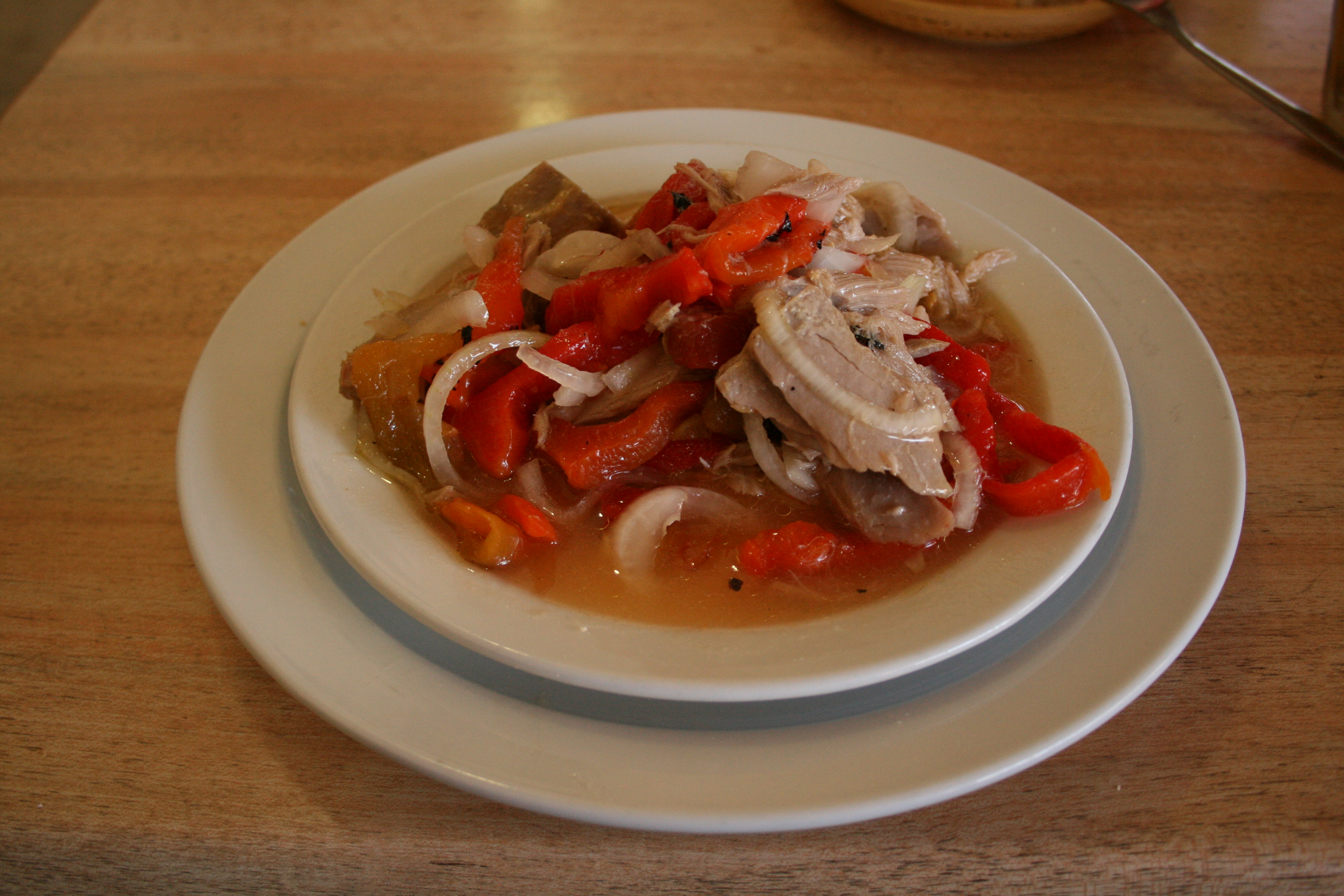 Atún aliñao - Atún aliñado con pimientos y cebollas